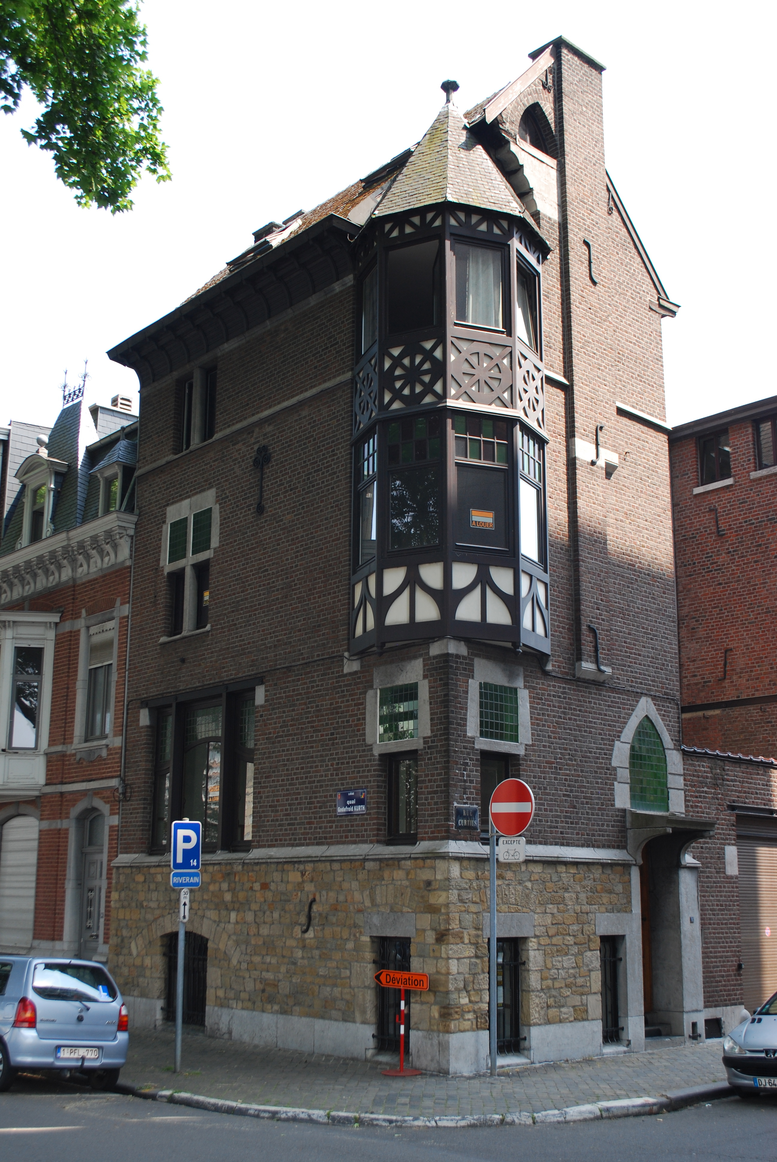 Vue des bords de Meuse à Liège, entre le pont Atlas et le pont Maghin.